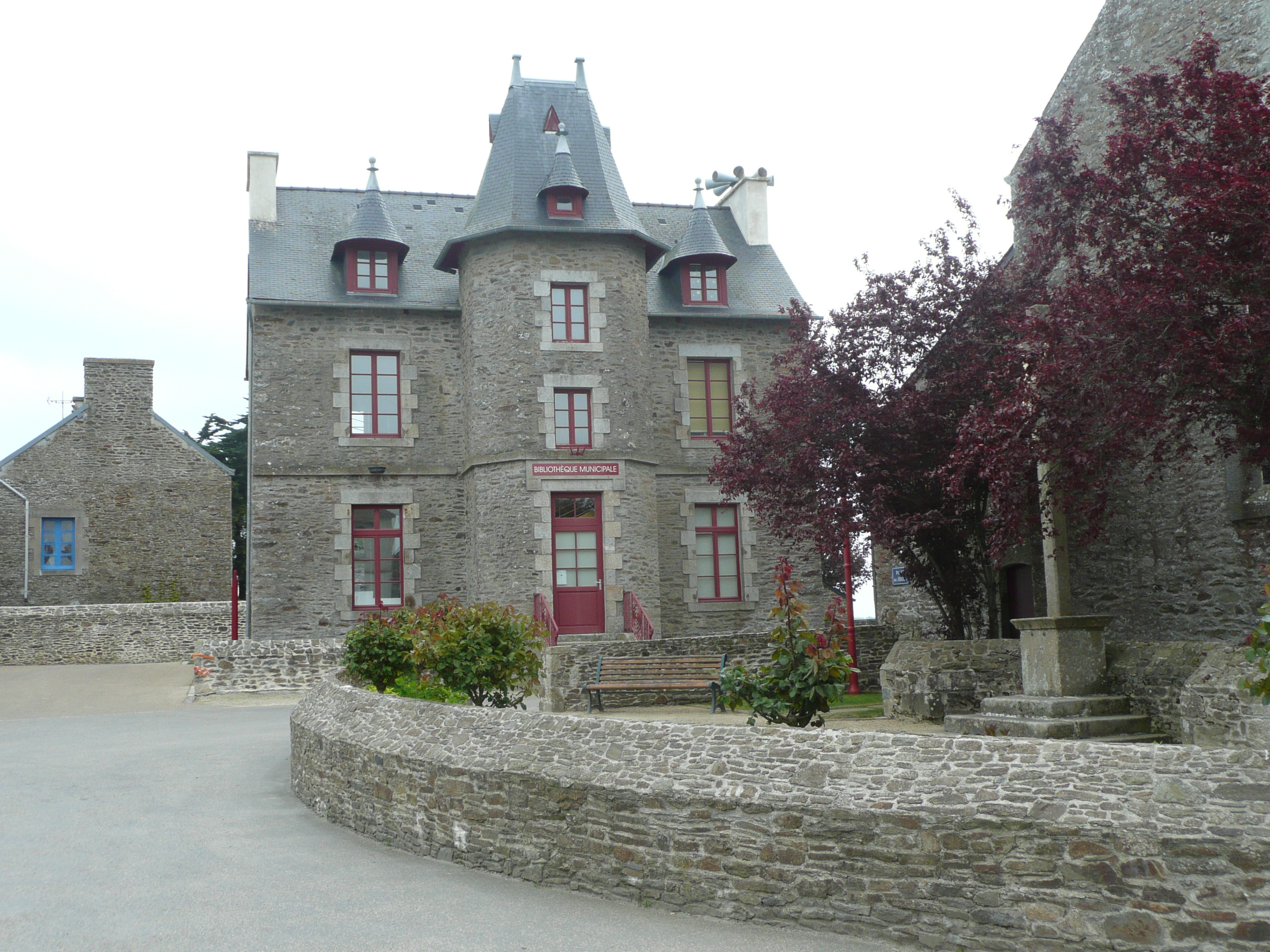 Bibliothèque municipale, Le Minihic-sur-Rance (Bretagne, France)